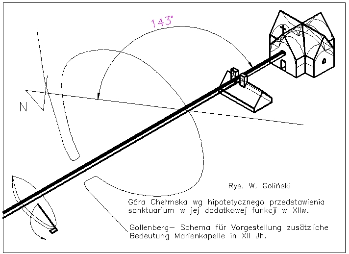 Szkic sanktuarium na Górze Chełmskiej